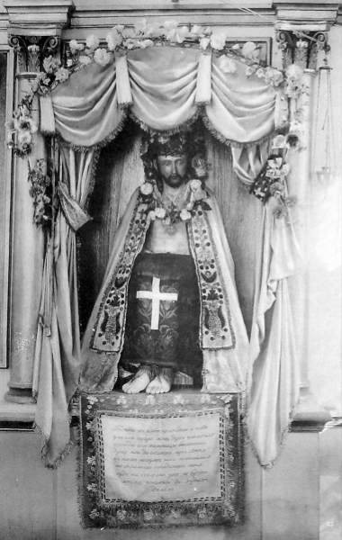 Изображение страждущего спасителя. Фото нач. XX в.